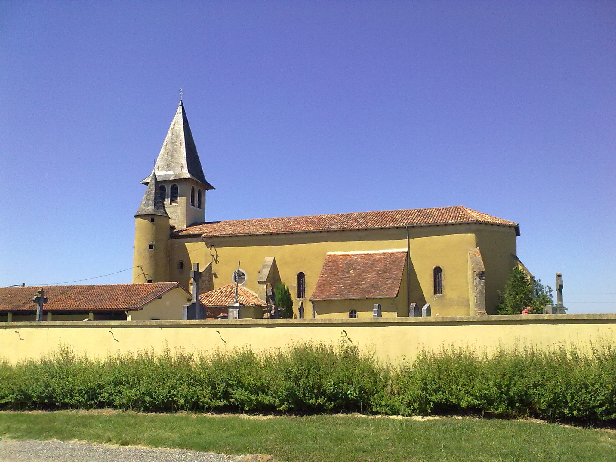 Saint-Médard (Pyrénées-Atlantiques) le 18 juillet 2010, France.